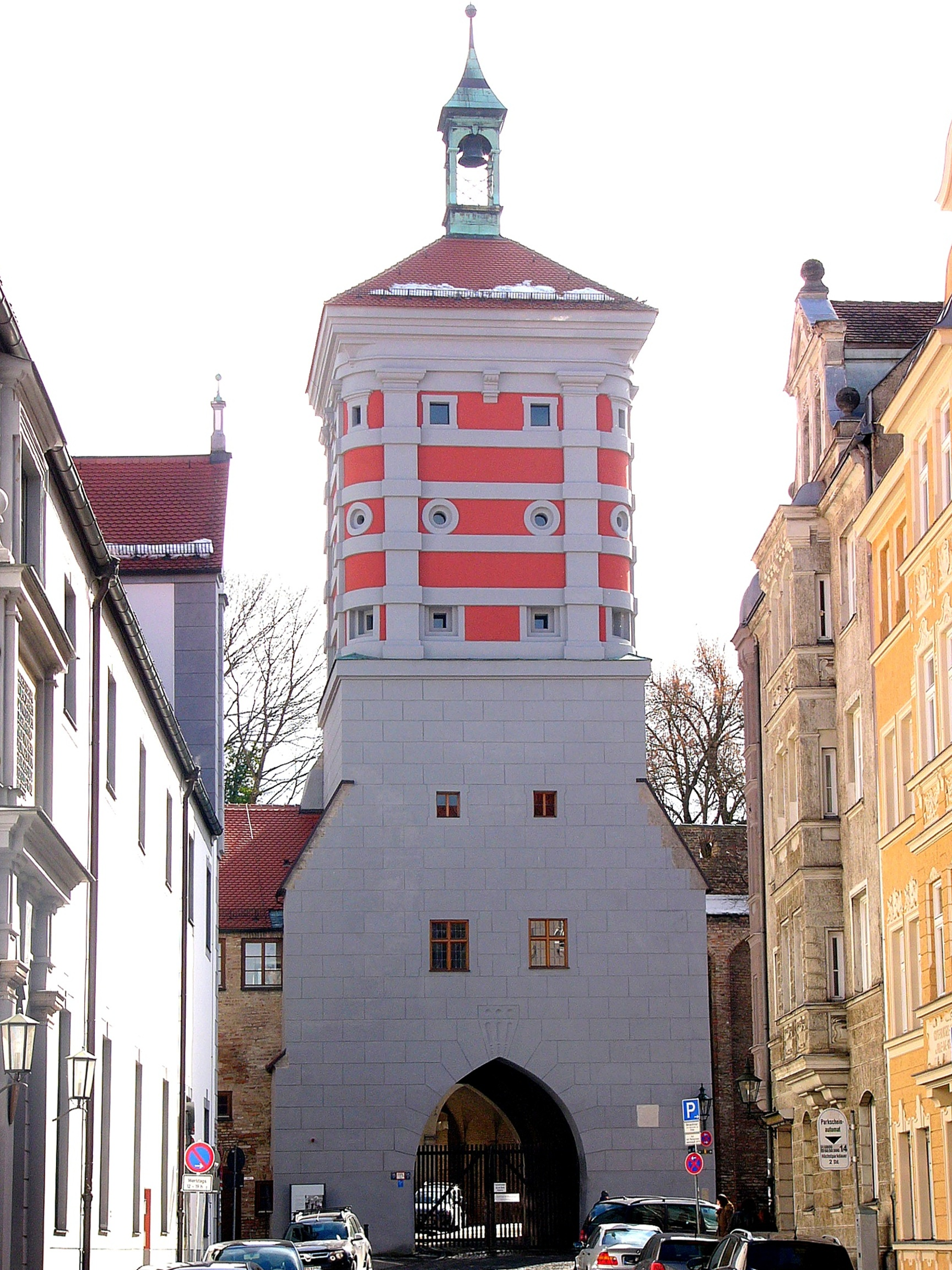 Rotes Tor, über einem gotischen Bau errichtet, quadratischer Unterbau mit spitzen Torbögen, Obergeschoss mit abgerundeten Ecken, Pilastergliederung und horizontalen Putzbändern, Zeltdach mit Laterne, von Elias Holl, 1622; Vortor, niedriger Torbau mit Zeltdach und tonnengewölbter Durchfahrt, 1545/46; Wallbastei mit gewölbten Kasematten, 1611; Roter Torwall und -mauer sowie Teile der Stadtmauer, 1545/46; Brücke vor dem Roten Tor, zweigeschossig zu sechs Bögen, bez. 1777; Die Wallanlagen mit der Bastei nach Aufhebung der Festungseigenschaft in der 2. Hälfte des 19. Jahrhunderts in eine Parkanlage umgewandelt, die mehrere Gestaltungen erfuhr (die letzte 1952 durch Ludwig Römer). Hier erfolgte 1929 auch der Einbau der Freilichtbühne; siehe auch Stadtbefestigung.This is a photograph of an architectural monument.